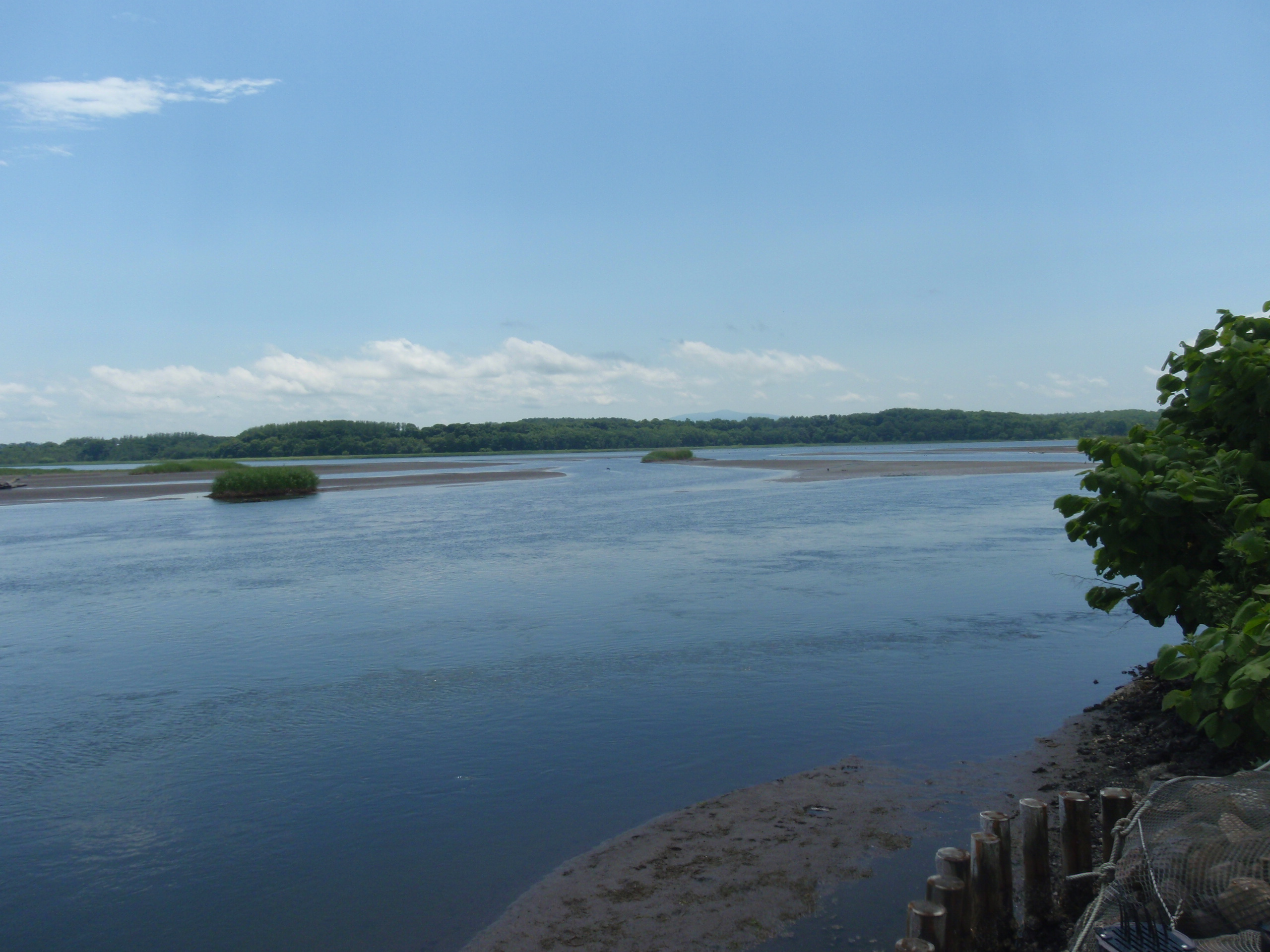 濤沸湖、流出部付近、網走市北浜の白鳥公園から撮影